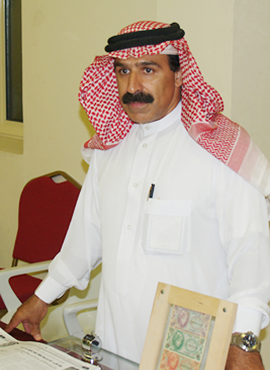 حسين السيد علي العوامي وهو في إحدى محاضراته